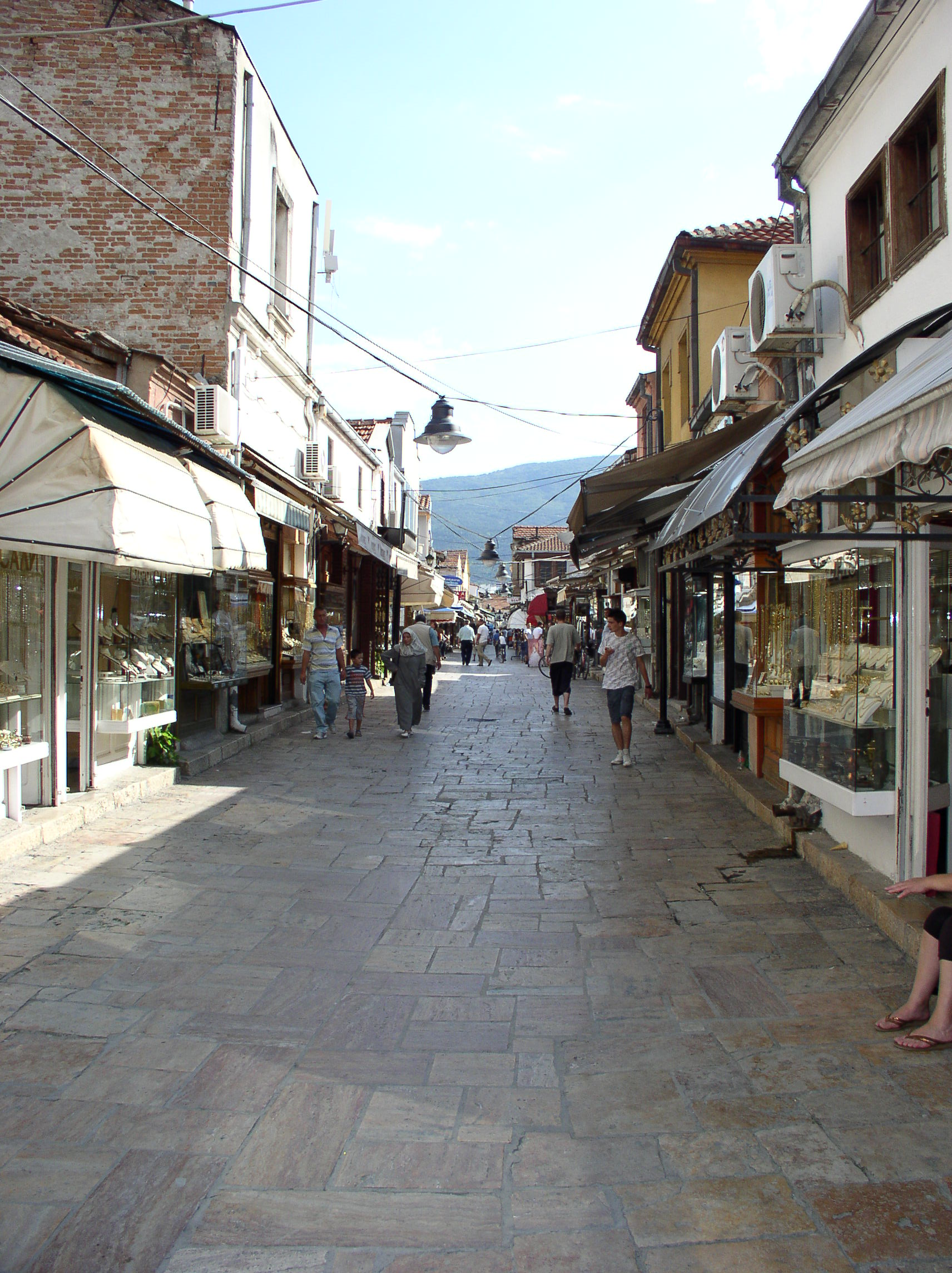 Beogradska ulica u Staroj čaršiji u Skoplju u Makedoniji